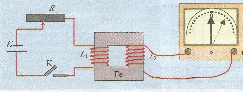 експеримент 2